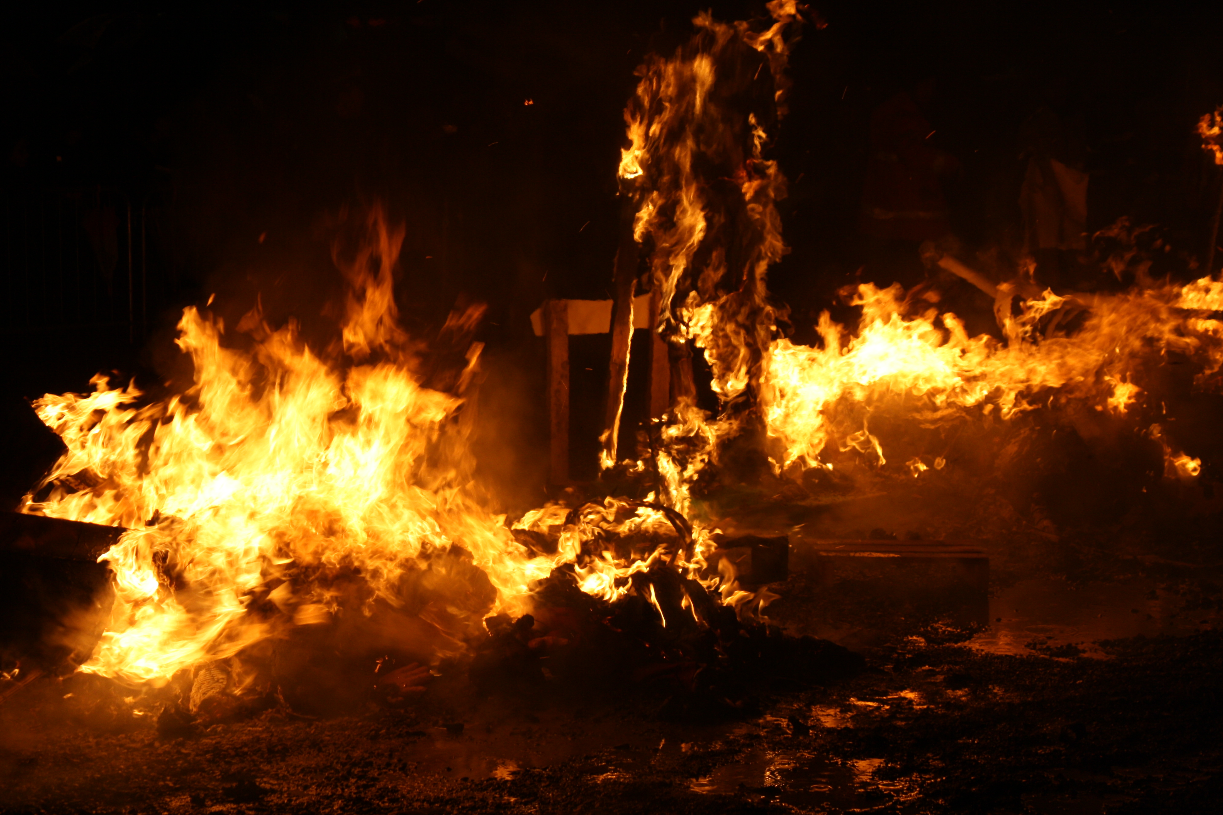 Rogo della Gioêubia della Famiglia Bustocca in piazza Venzaghi, a Busto Arsizio, il 30 gennaio 2014.